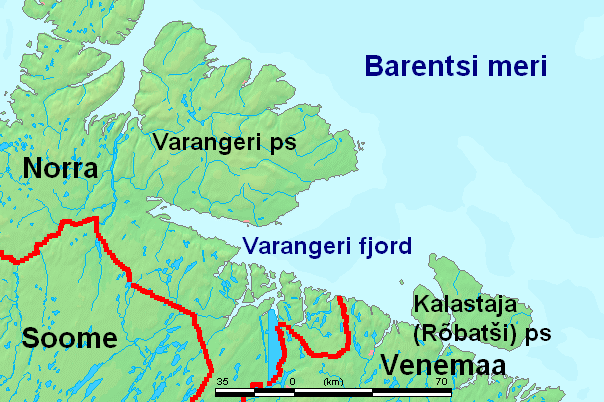 Varangeri fjordi kaart, kaardi alusel